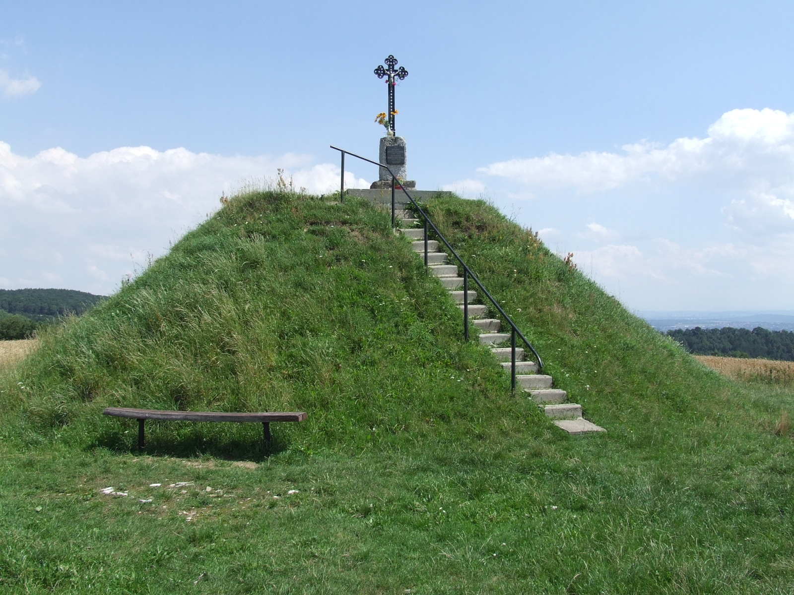 Będkowice - Kopiec Bzowskich (założycieli Będkowic)